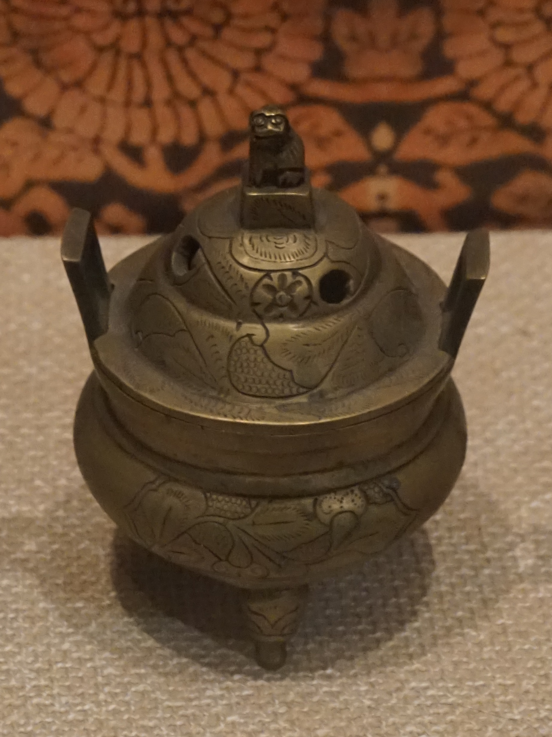 中文（中国大陆）: 番莲纹兽首三足铜香炉。明。北林区征集。三级文物。绥化市博物馆一楼